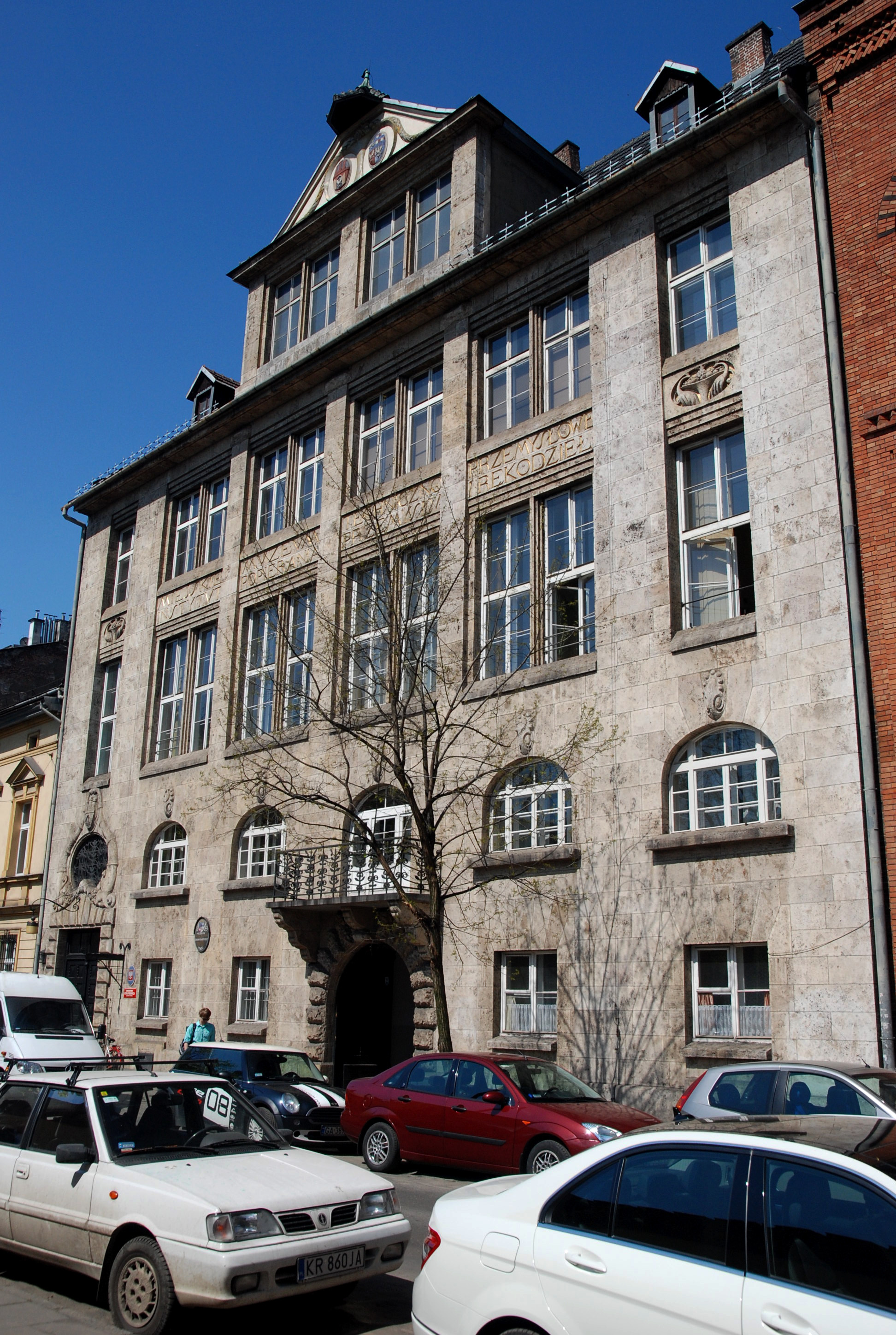 Dawne Muzeum Techniczno-Przemysłowe, obecnie budynek Akademii Sztuk Pięknych. Ul. Smoleńsk, KrakówArchitekci: Tadeusz Stryjeński i Franciszek Mączyński. Autor rzeźb: Józef Czajkowski. 1908-1914